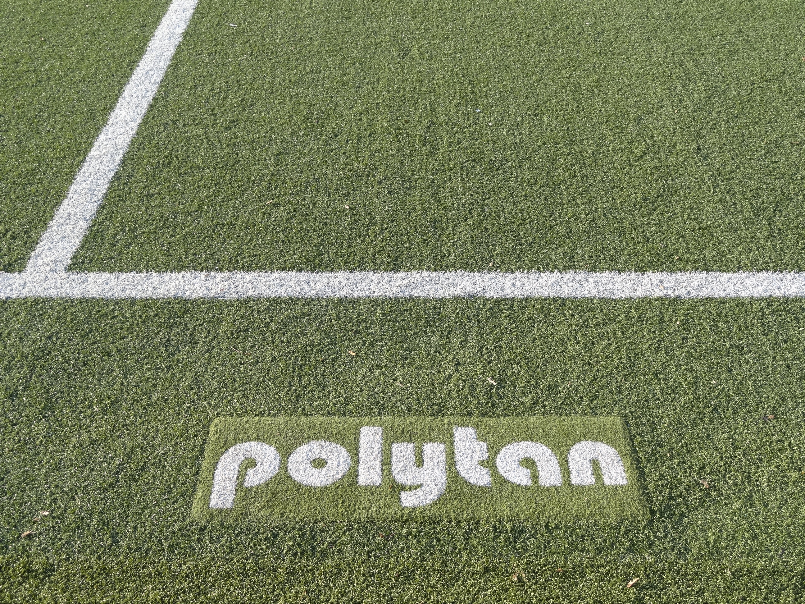 Artificial turf